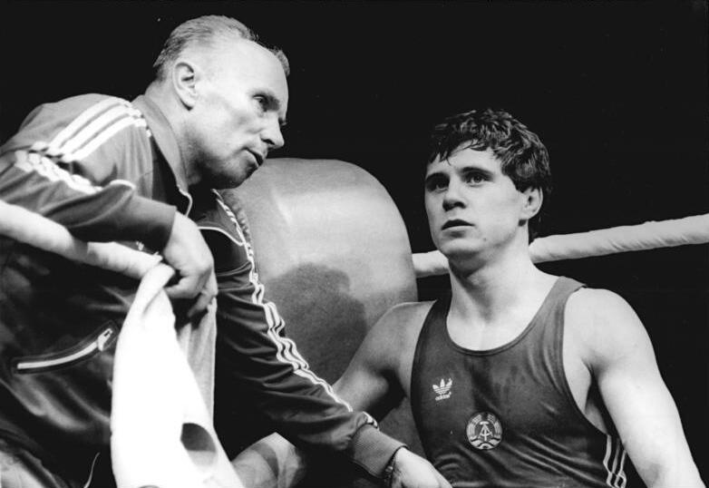 Günter Debert, Frank Rauschning ADN-ZB Pätzold-3.5.83 Berlin: DDR-Boxr für EM nominiert - Zum Aufgebot des DBV der DDR für die 25. Box-Europameisterschaften vom 7. bis 15. Mai 1983 in Warna gehört der 21jährige Kraftfahrzeugschlosser Frank Rauschning (SG Wismut Gera). Der Junioren-Europameister von 1980 und zweifache DDR-Meister (1981 und 1982) startet als EM-Neuling im Federgewicht. Im Foto mit Verbandstrainer Günter Debert beim Länderkampf DDR-USA am 11.2.1983 in Schwerin.